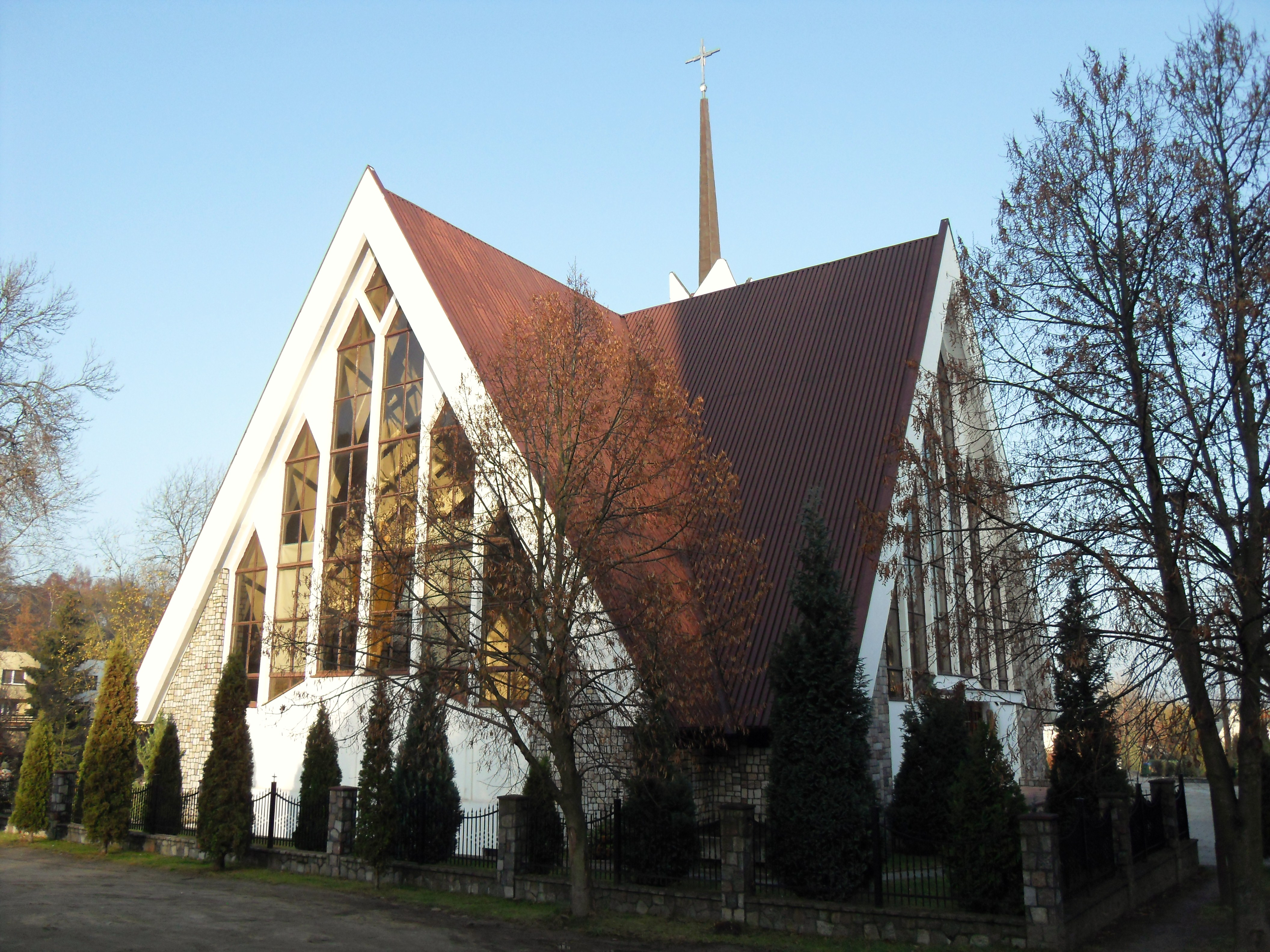 Gdańsk VII Dwór, kościół pw. Świętego Stanisława Kostki.